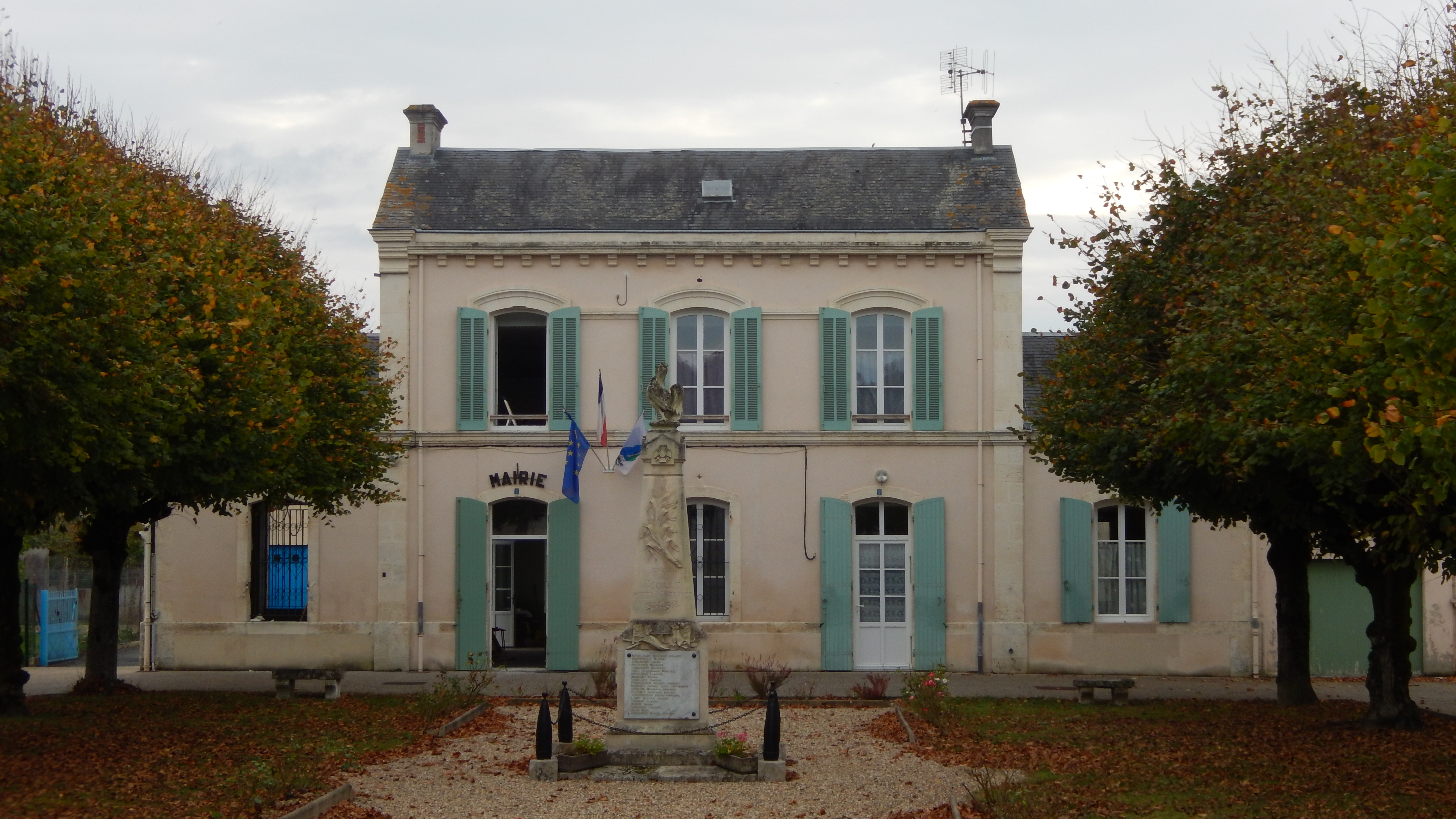 La mairie de Nuaillé-sur-Boutonne, en Charente-Maritime.